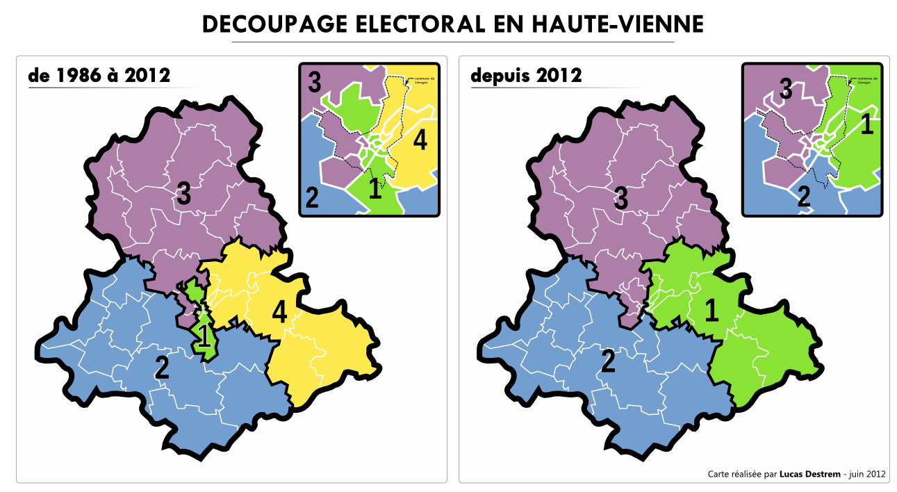 Carte du découpage électoral des circonscriptions de Haute-Vienne (avant 2012 et depuis 2012)